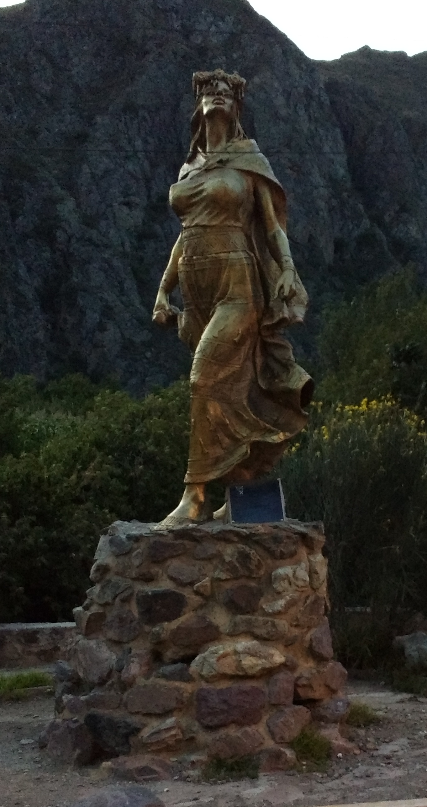 Estatua de Ñusta Kura Oqllo (Cura Ocllo) en Ollantaytambo, Perú.